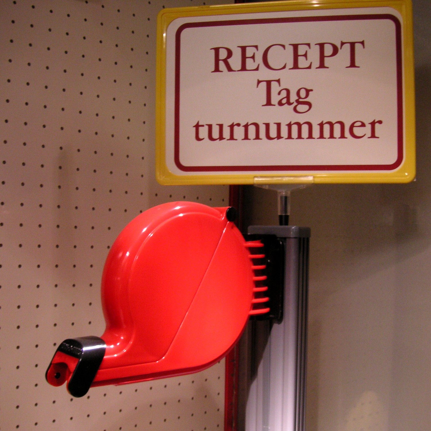 A&E Design, kölappsystemet för Turn-O-Matic